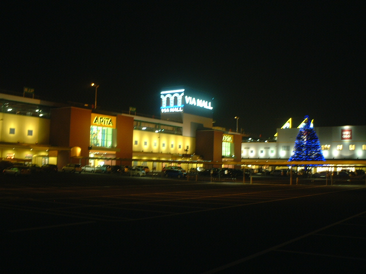 via mallの画像